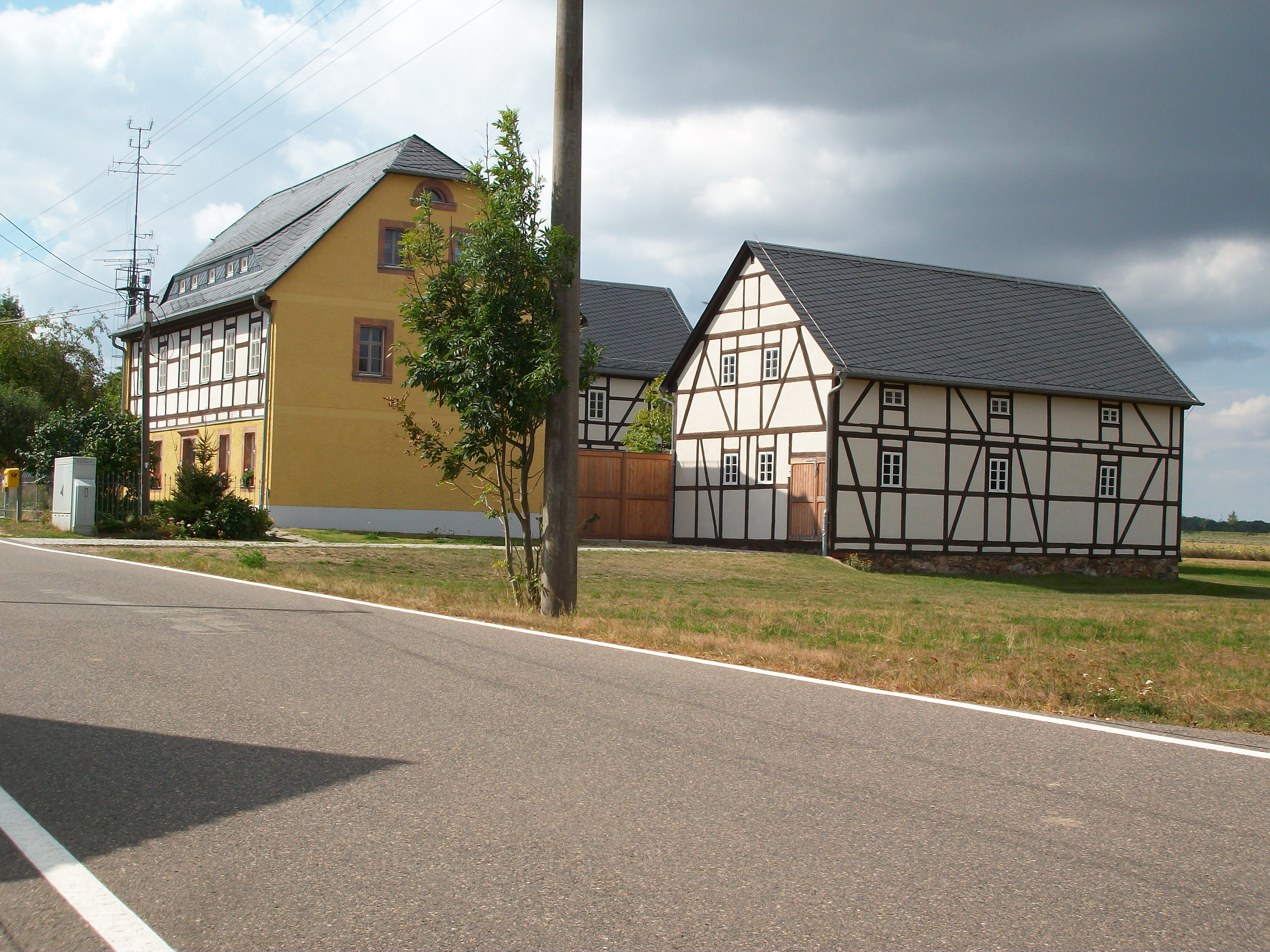 Bernsdorf (Seelitz), Bernsdorfer Straße 11